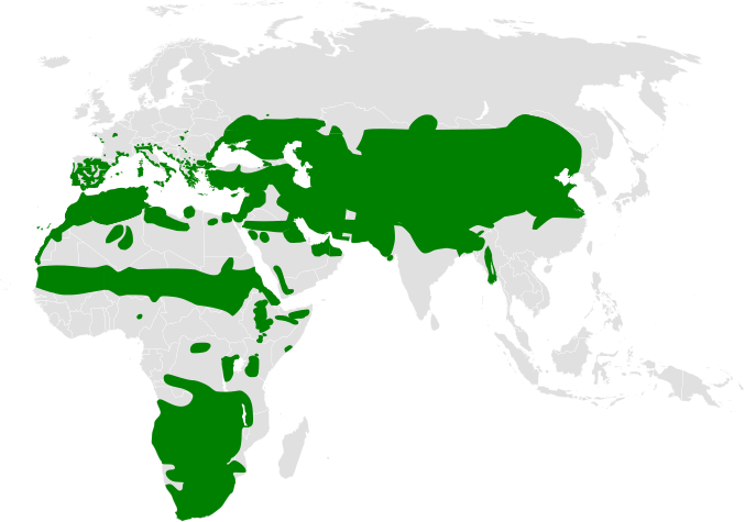 Calandrella distribution map